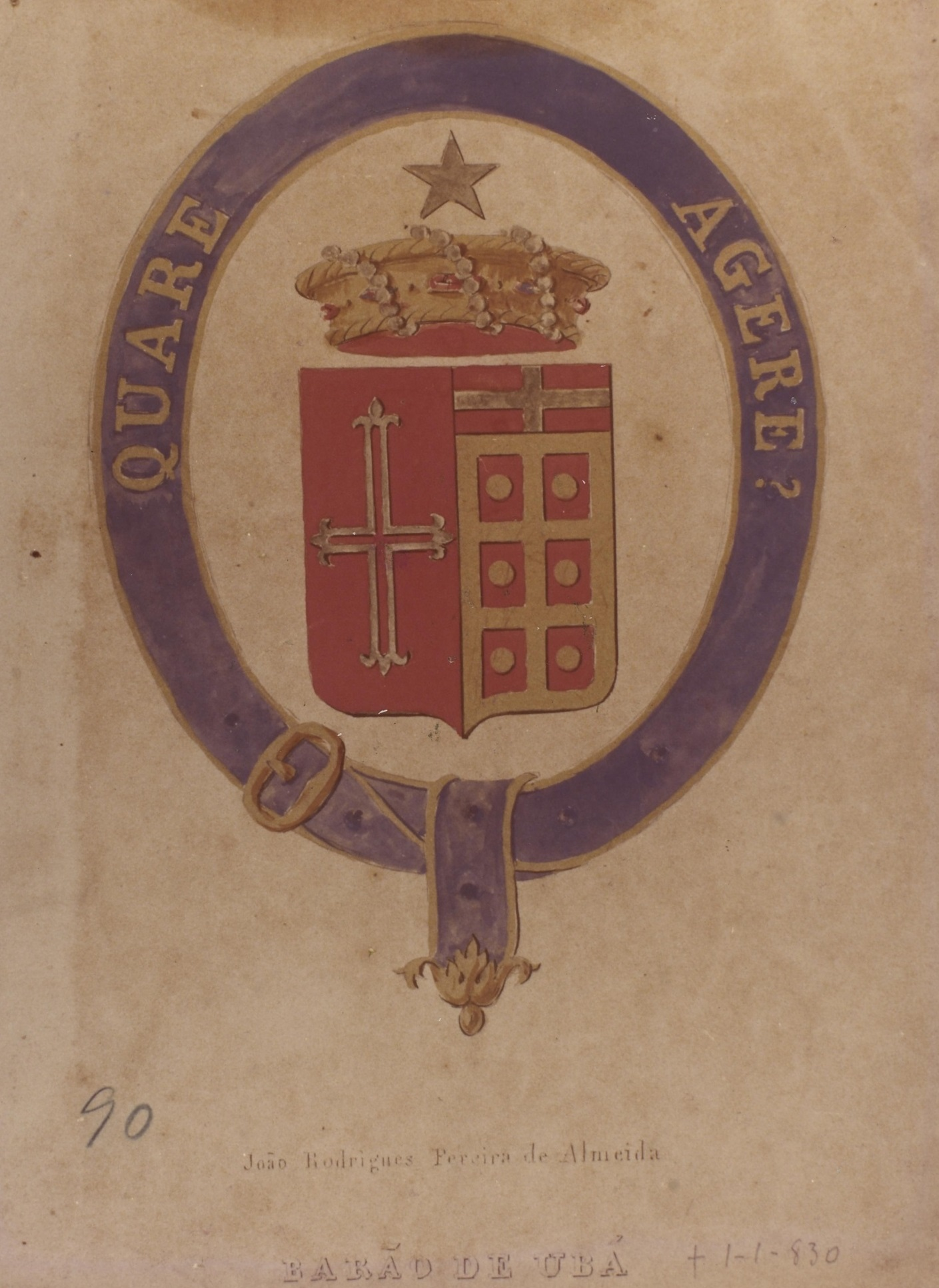 Brasão de João Rodrigues Pereira de Almeida, Barão de Ubá. Fundo: Brasões.